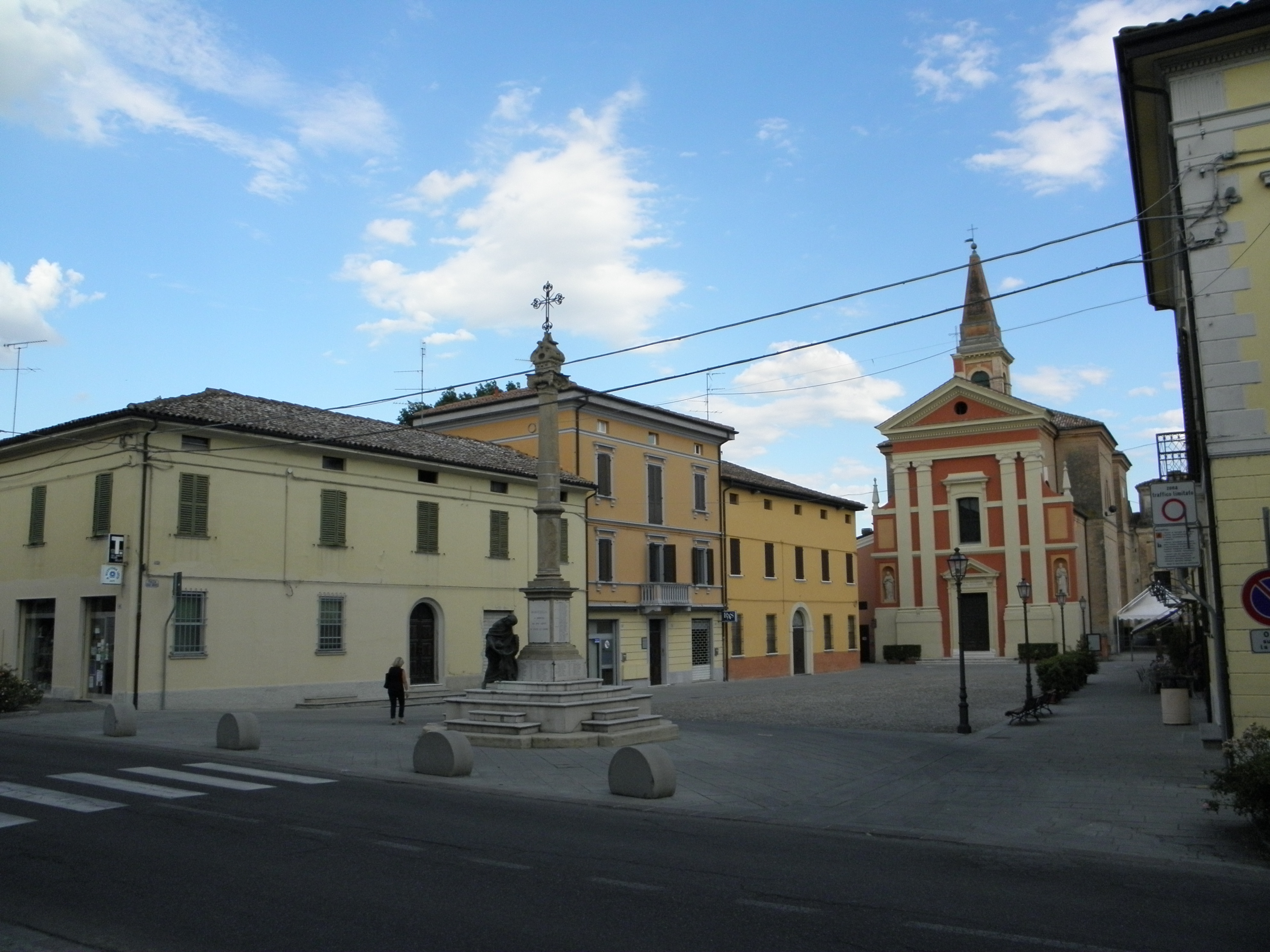 Baricella, Piazza Giosuè Carducci: vista degli edifici sul lato nord, del Monumento ai Caduti ed in secondo piano della Chiesa di Santa Maria.